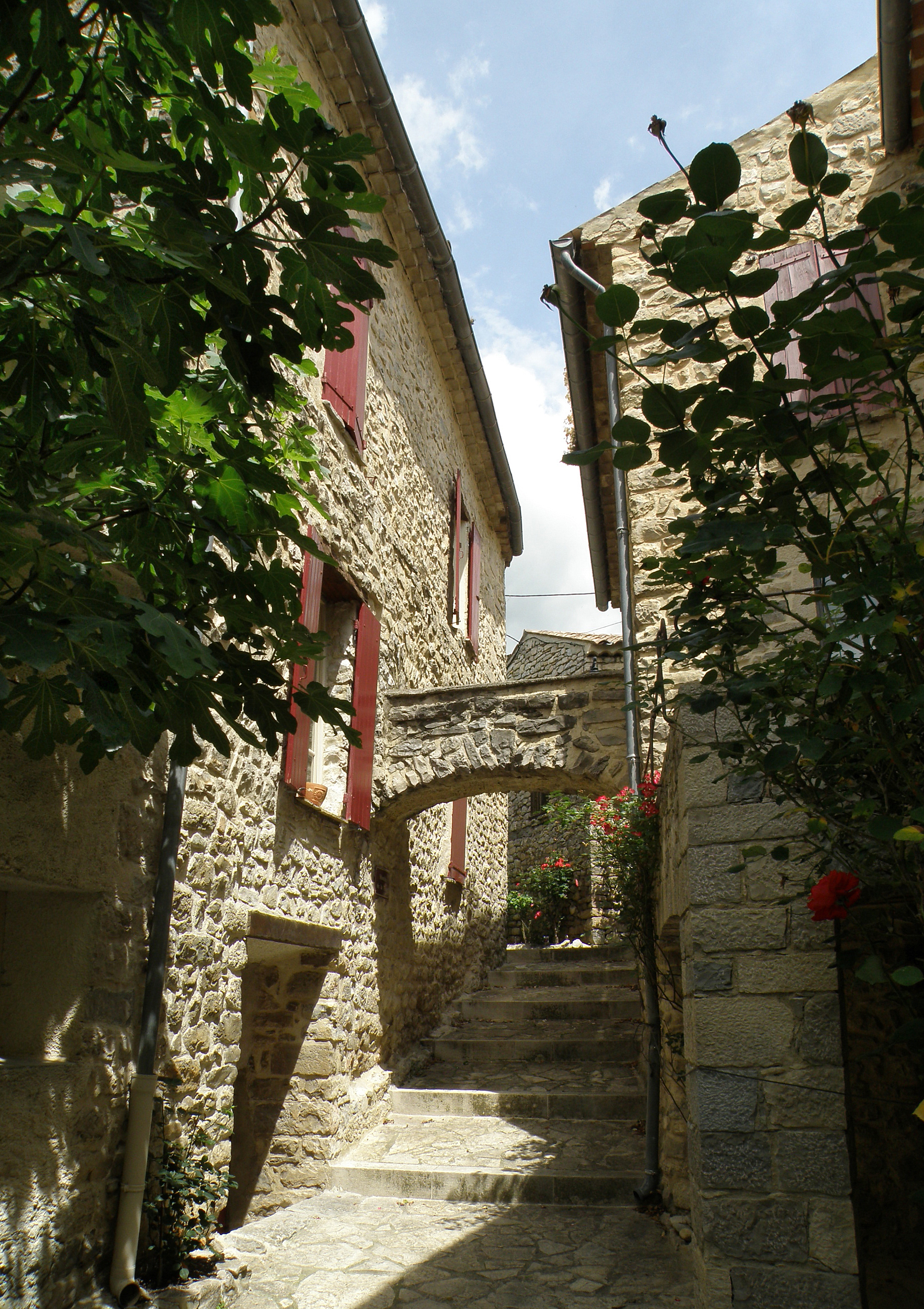 Sainte-Euphémie-sur-Ouvèze (comm. de la Drôme, France). Aspect du vieux bourg.